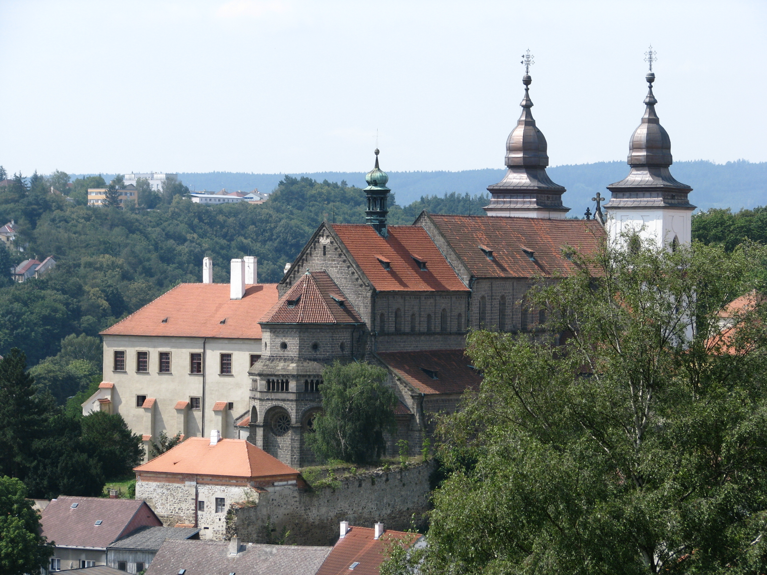 Zámek - býv. klášter s bazilikou sv. Prokopa Třebíč, 9. května 1, Třebíč